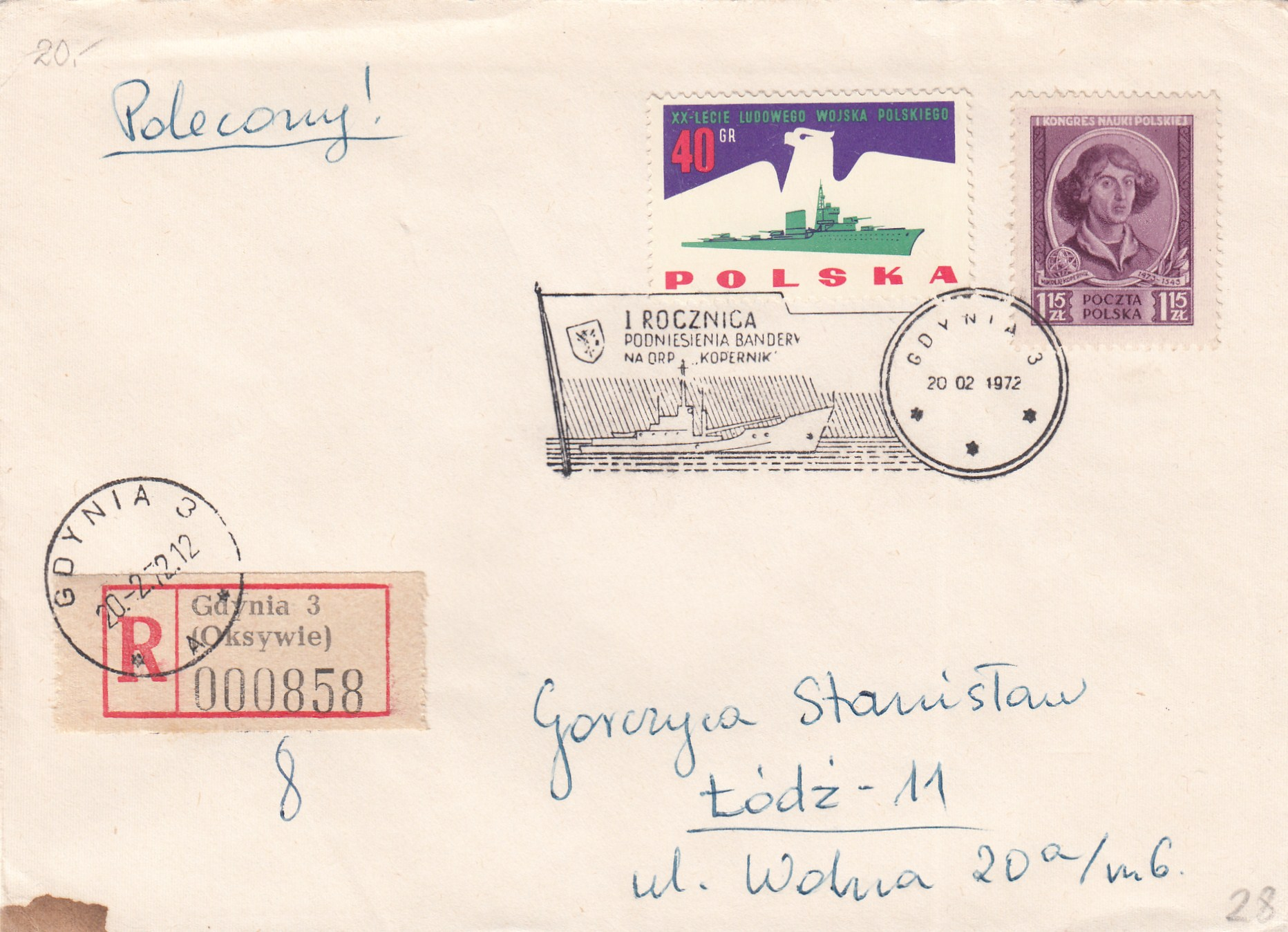 Stempel okolicznościowy na kopercie obiegowej o treści "1. rocznica podniesienia bandery na ORP Kopernik. List nadany 20 II 1972 roku. Ze zbiorów prywatnych. Inna, podobna koperta, zostanie przekazana do zbiorów Muzeum Marynarki Wojennej w Gdyni. ORP Kopernik to okręt hydrograficzny; bliżej o nim w haśle na polskiej Wiki